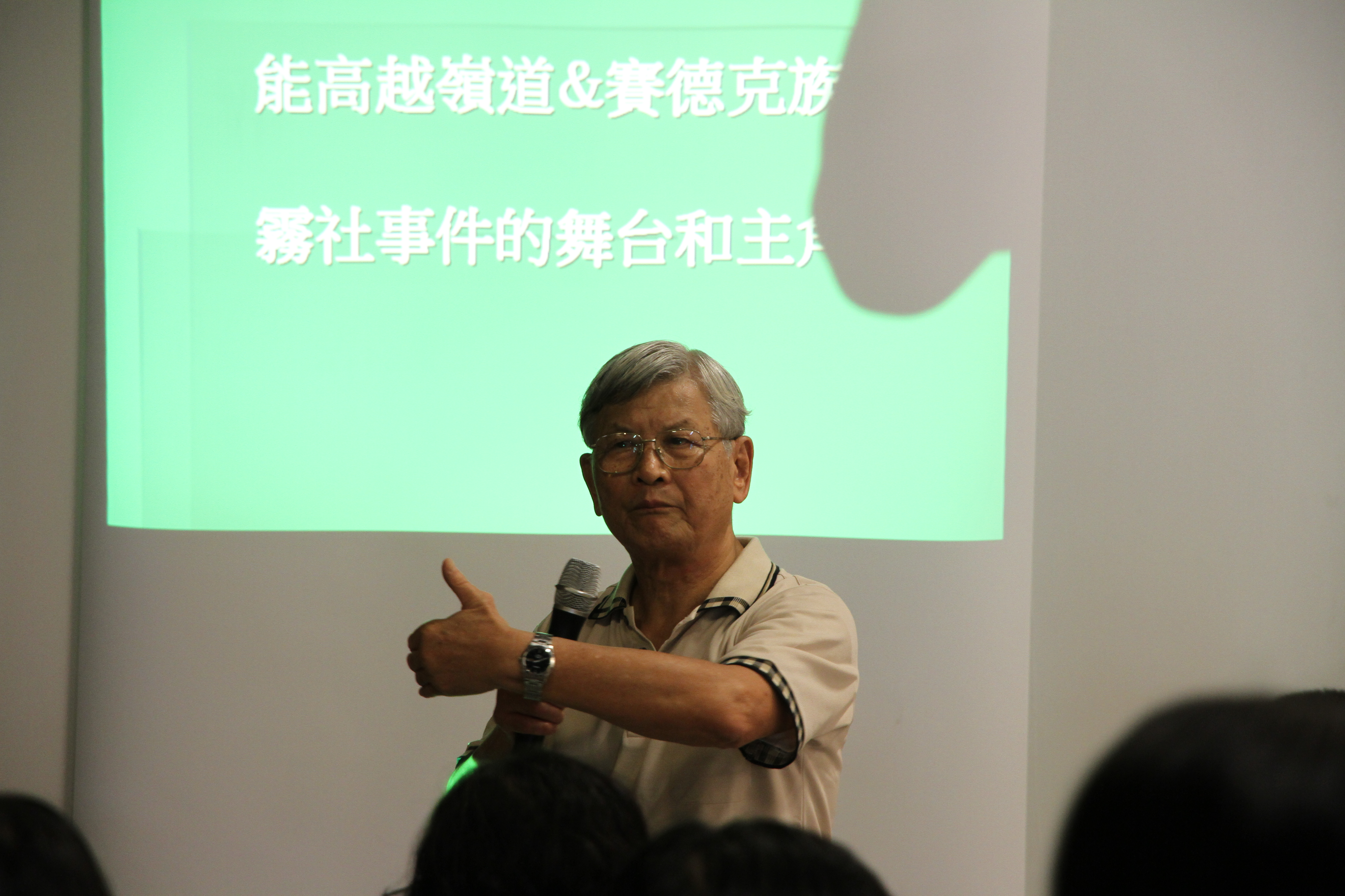 林務局全國步道展 楊南郡81歲演講"霧社事件的舞台和主角"